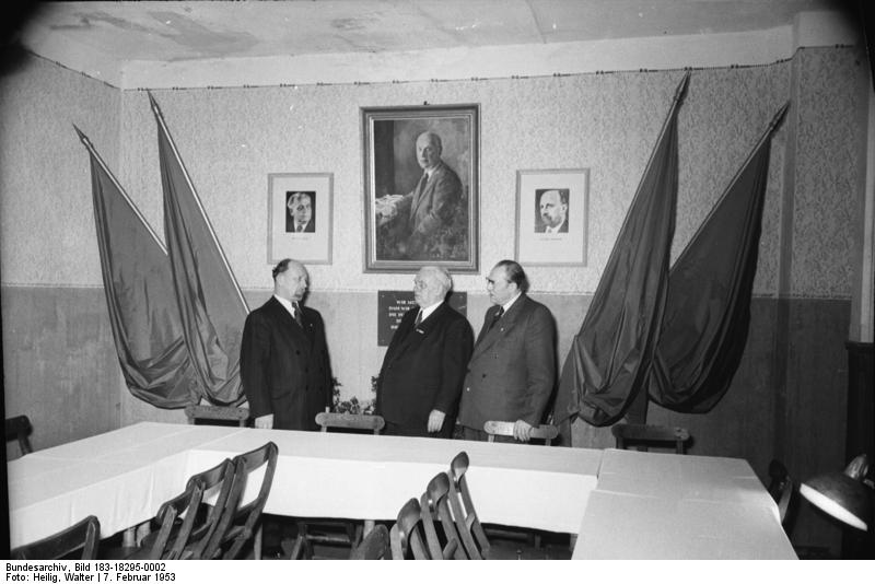 Ziegenhals, 11. Plenum ZK der SED Zentralbild/Heilig 7.2.1953 Das 11. Plenum des Zentralkomitees der Sozialistischen Enheitspartei Deutschlands tagte. An der Stelle (Sporthaus Ziegenhals bei Königswusterhausen), wo vor 20 Jahren Ernst Thälmann zum letzten Male vor dem Zentralkomitee und den Bezirks-Sekretären der Kommunistischen Partei Deutschlands sprach, tagte heute am 7.2.1953 das 11. Plenum des Zentralkomitees der SED. Das Hauptreferat hielt der Generalsekretär der SED Walter Ulbricht über Ernst Thälmanns Kampf gegen Krieg und Faschismus. (Näheres siehe ADN und SED Pressedienst) UBz.: Die beiden Vorsitzenden der SED Wilhelm Pieck, Otto Grotewohl und der Generalsekretär Walter Ulbricht in dem Versammlungsraum, in dem am 7. Februar 1933 Ernst Thälmann zum letzten Mal gesprochen hatte. Dieser Raum ist als Gedenkstätte eingerichtet worden. Abgebildete Personen: Grotewohl, Otto: Ministerpräsident, stellvertretender Staatsratsvorsitzender, DDR Pieck, Wilhelm: Präsident, Politbüro der SED, Vorsitzender der KPD, DDR Ulbricht, Walter: Staatsratsvorsitzender, Erster Sekretär des Zentralkomitees (ZK) der SED, Vorsitzender des Nationalen Verteidigungsrates, DDR